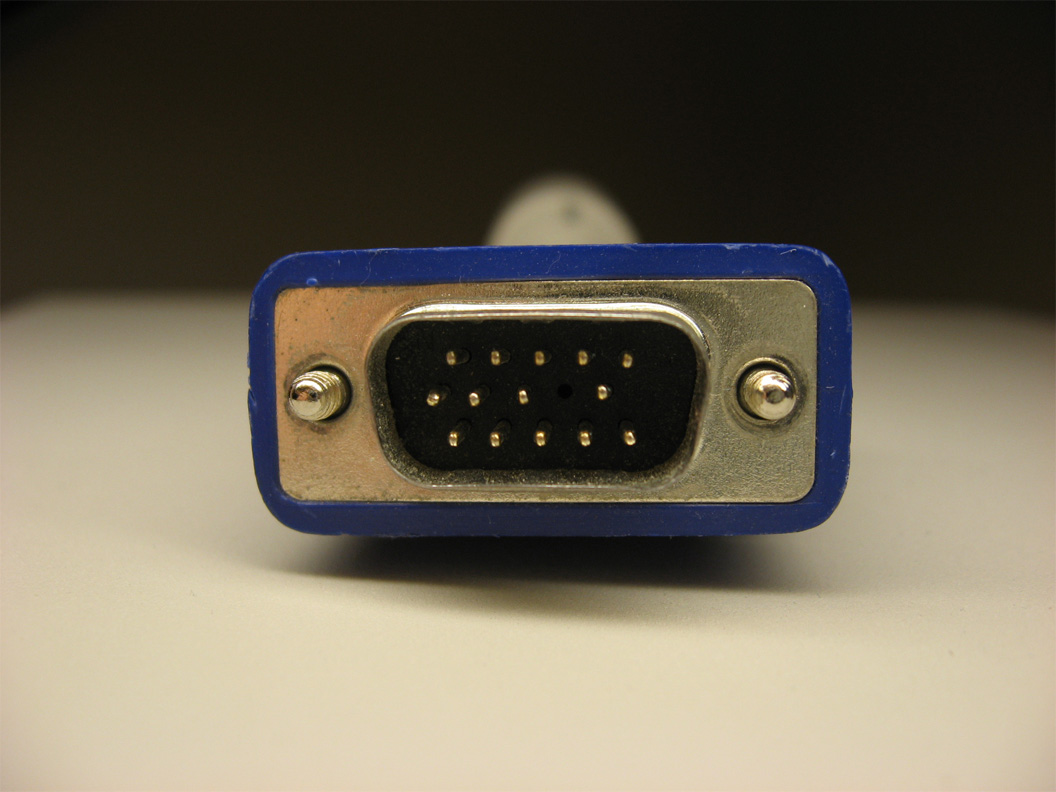 A standard VGA plug.